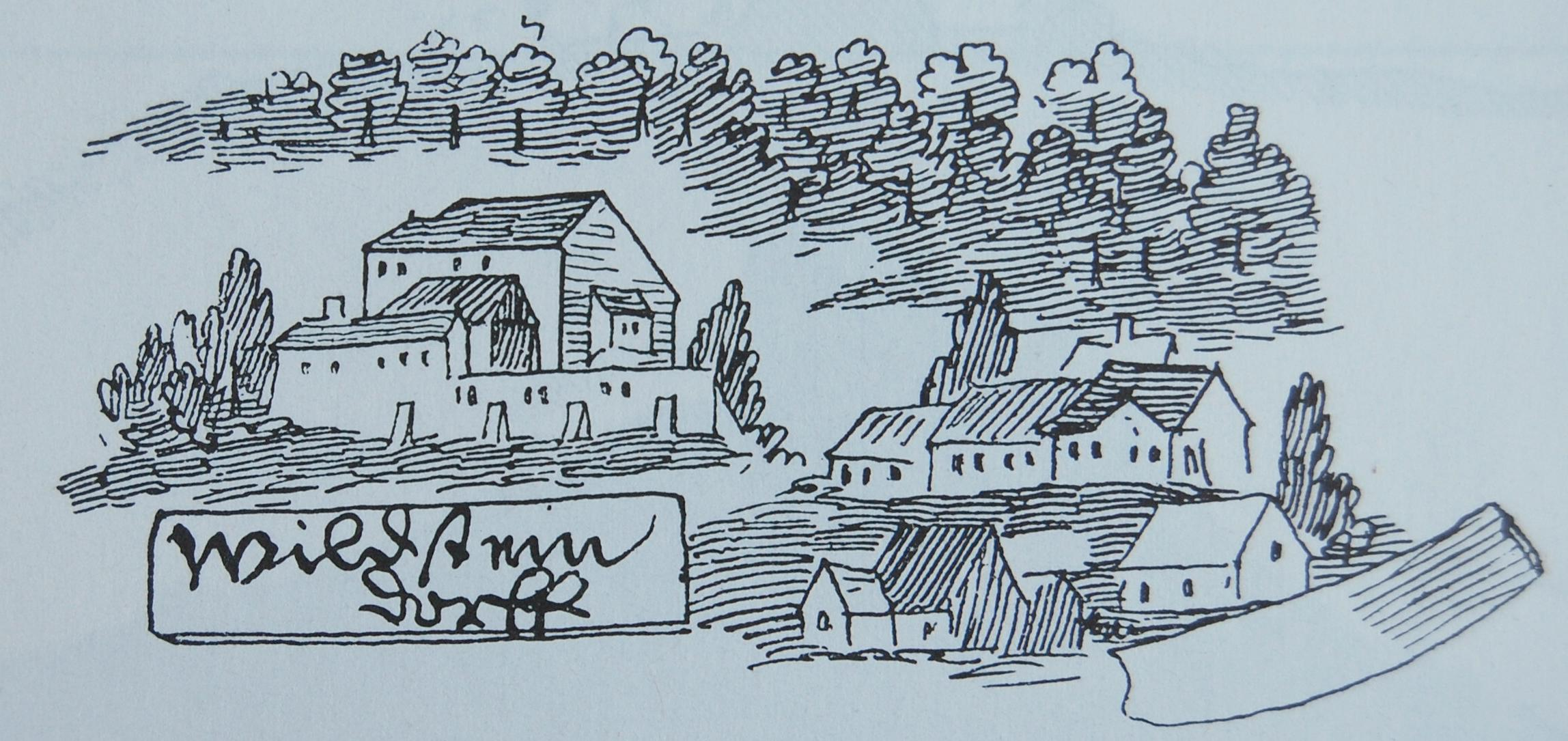 Ansicht des ehemaligen Schlosses Wildstein auf einer Karte des Amtes Murach aus dem Jahre 1589